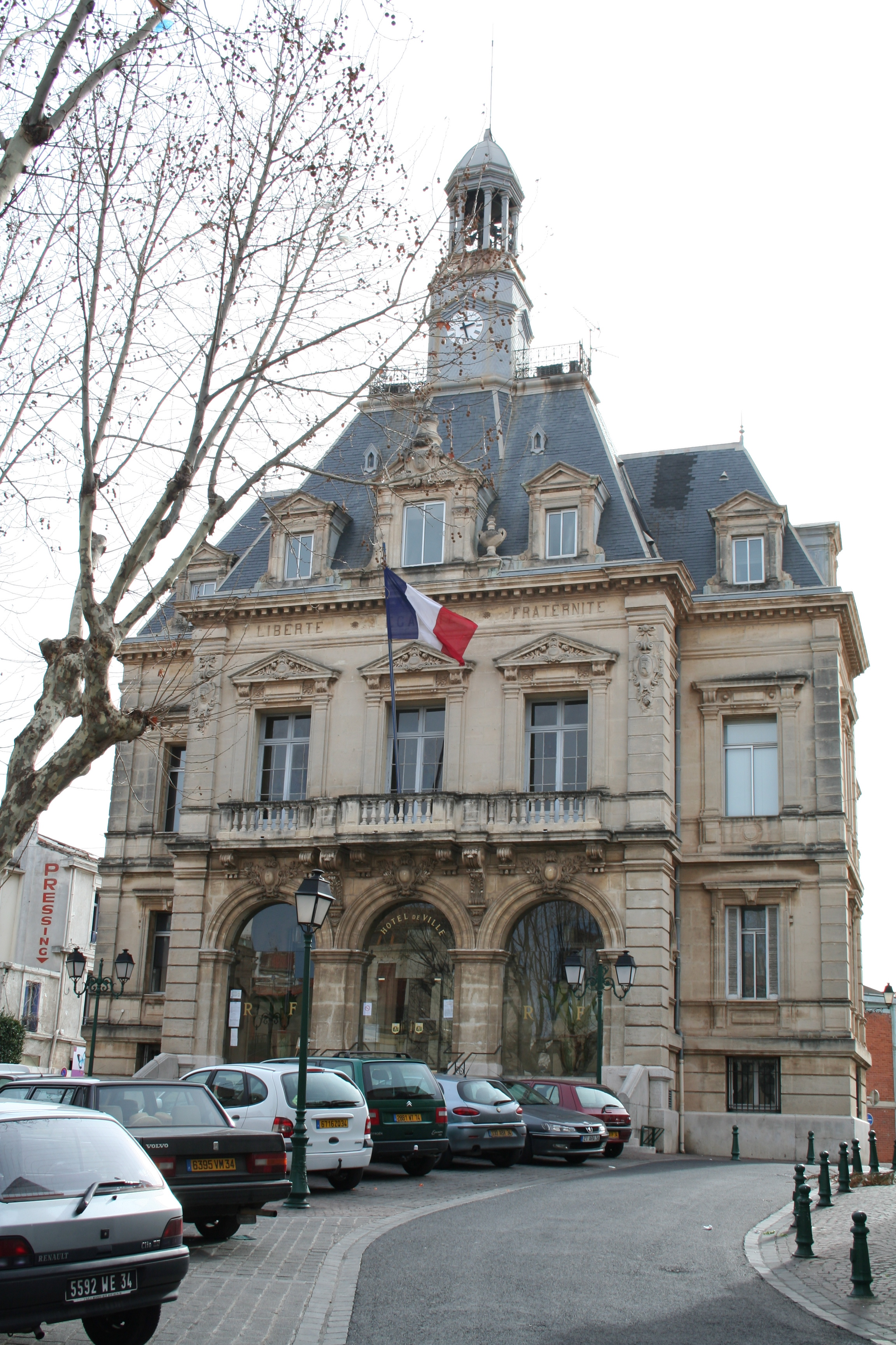 Frontignan (Hérault) - Mairie, construite en 1896 sur l'emplacement de l'ancien château de Frontignan.